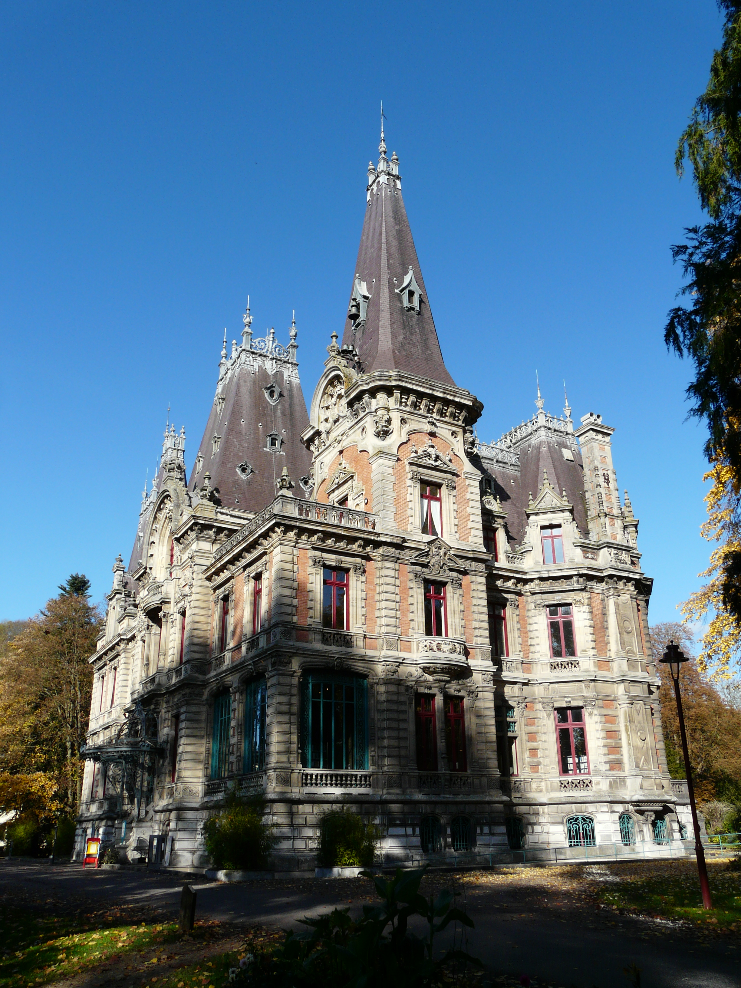 Château de Marbeaumont (Bar-le-Duc) : vue d'ensemble